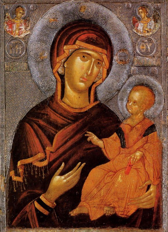 Данная икона является одной из двух двусторонних икон, полученных архиепископом Охрида Григорием в дар от византийского императора Андроника II и вложенных им в кафедральный собор Охрида, храм Св. Софии